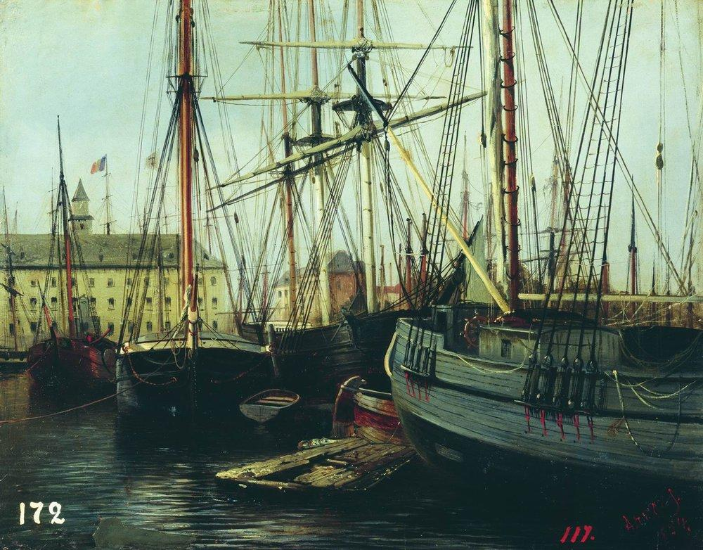 Antwerp, Belgium.